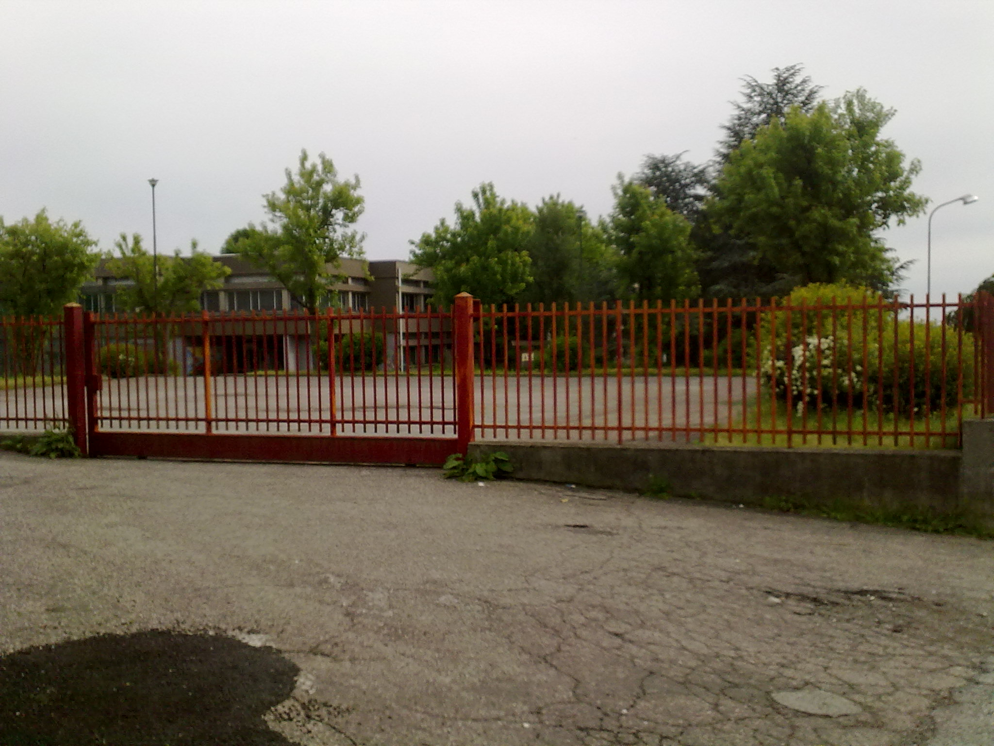 Scuola media A.Moro - Prestino